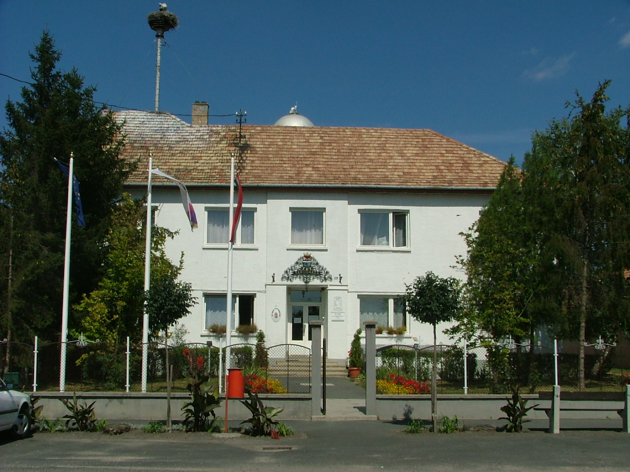 Téti városháza